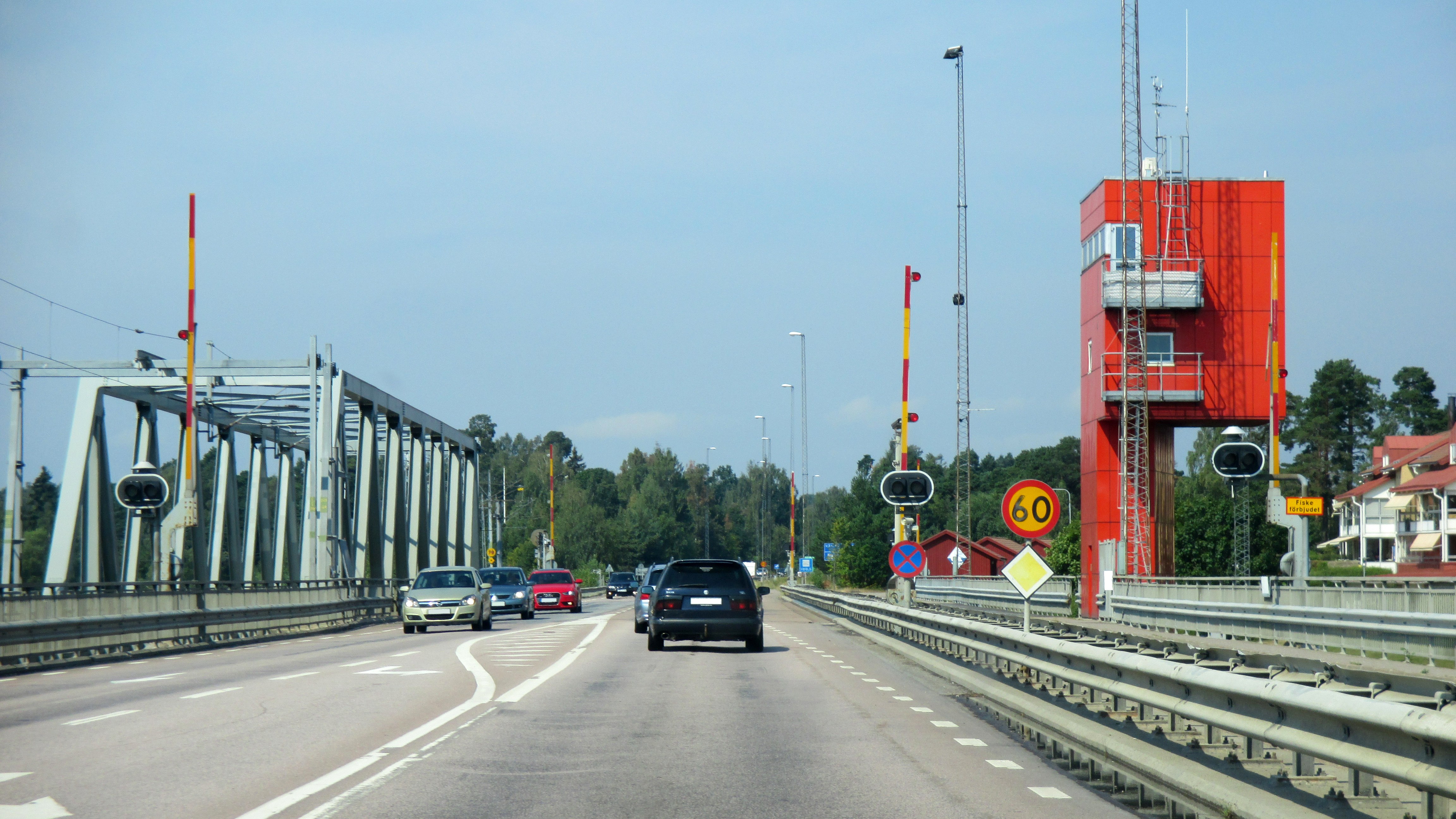 Kvicksundsbron över Mälaren mellan Södermanland och Västmanland, Sverige.